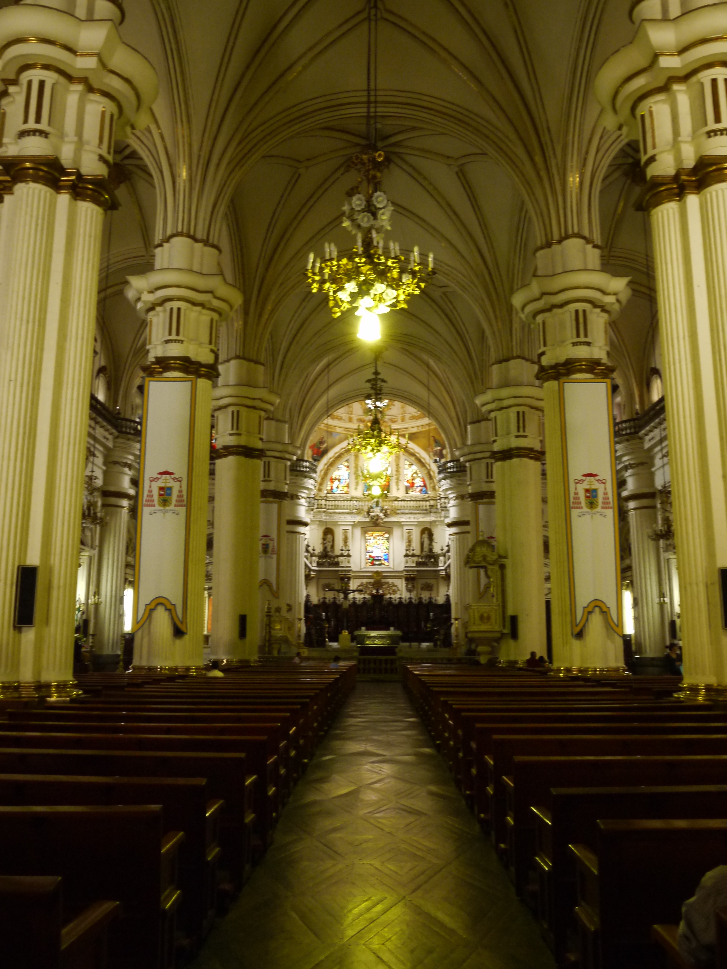 Catedral de Guadalajara-interior